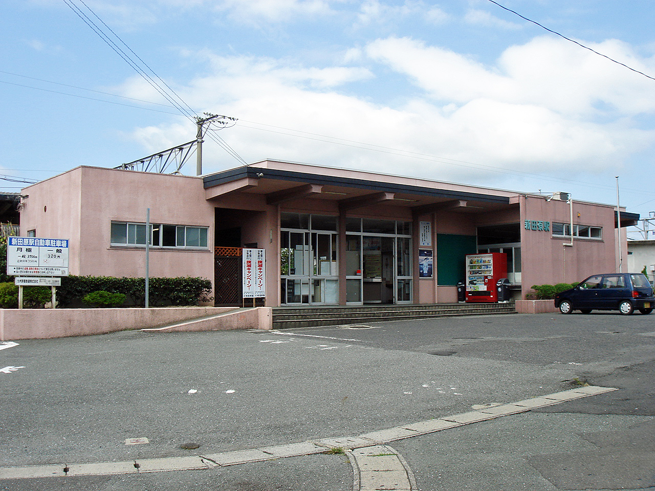 日豊本線新田原駅